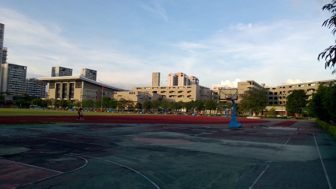 佛山市华英学校中由我自己拍摄的图片，用于词条佛山市华英学校